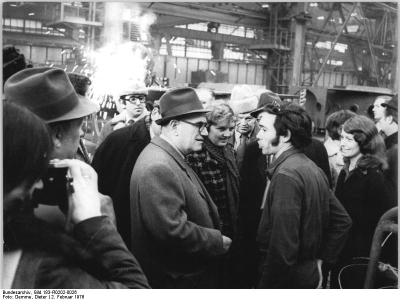 Erfurt, Istvan Sarlos im Gespräch ADN-ZB Demme 2.2.76 Erfurt- Eine Delegation der Patriotischen Volksfront Ungarns unter der Leitung des Mitgliedes des Politbüros des ZK der USAP und Generalsekretär der Patriotischen Volksfront, Istvan Sarlos (Mitte), besuchte am 2.2.76 das Kombinat Umformtechnik "Herbert Warnke" Erfurt. Istvan Sarlos hier im Gespräch mit Zoltan Zsolnat aus der Abteilung Körperbau. (Siehe ADN-Meldung)